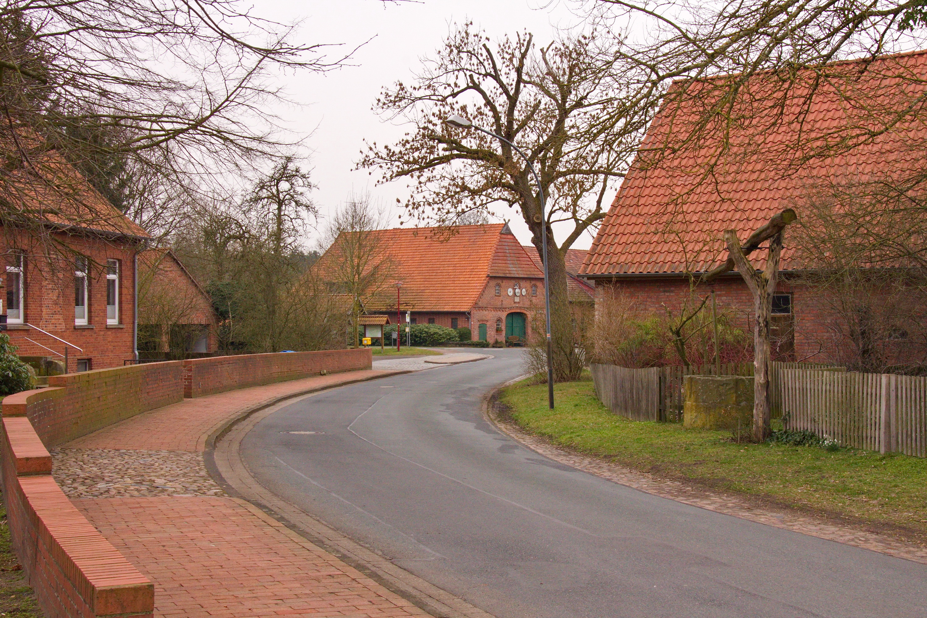 Ortsblick in Wittlohe (Kirchlinteln), Niedersachsen, Deutschland